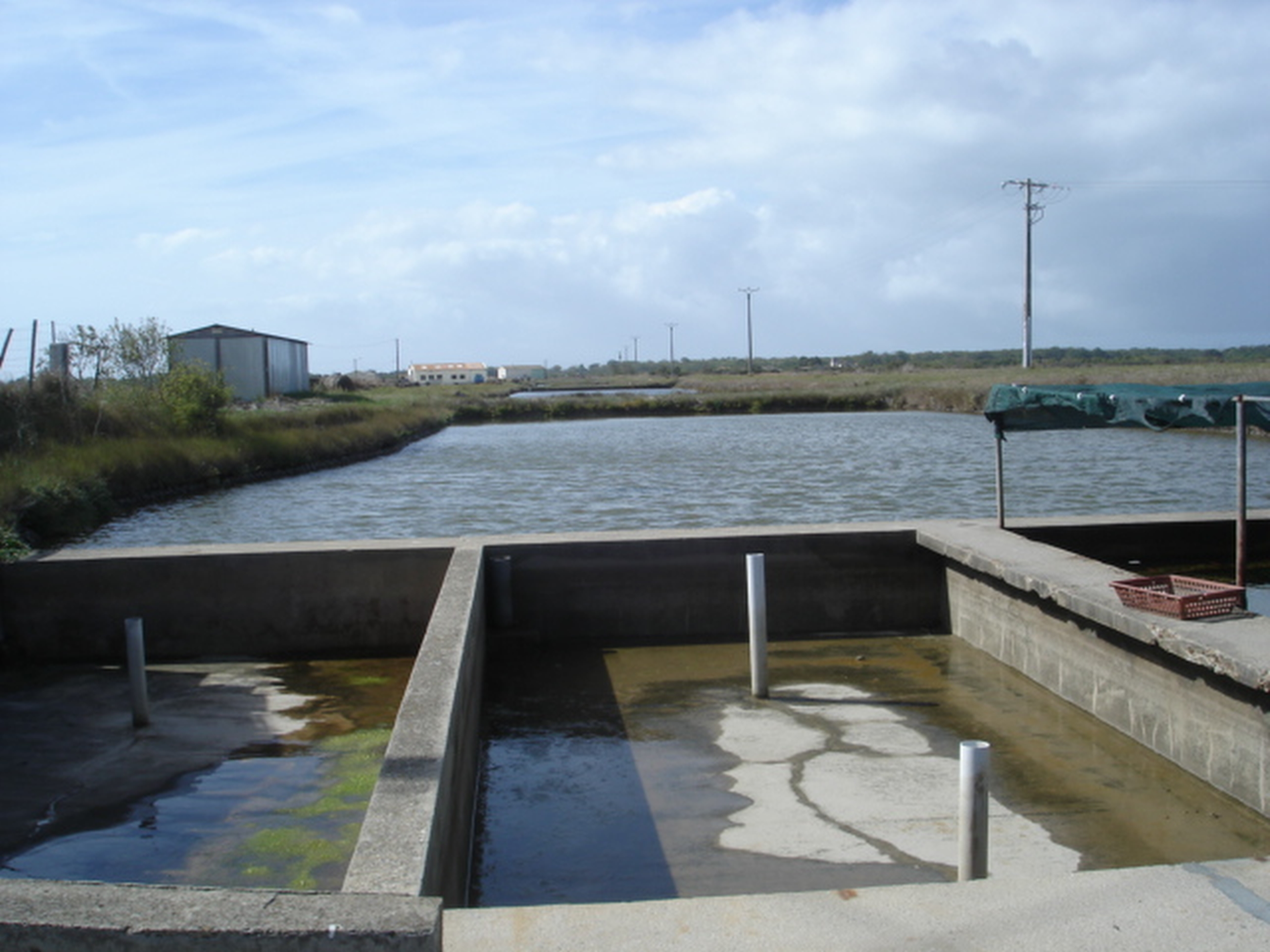 Bacs à huitres pour fines claires. Auteur : Jean-Claude Perez